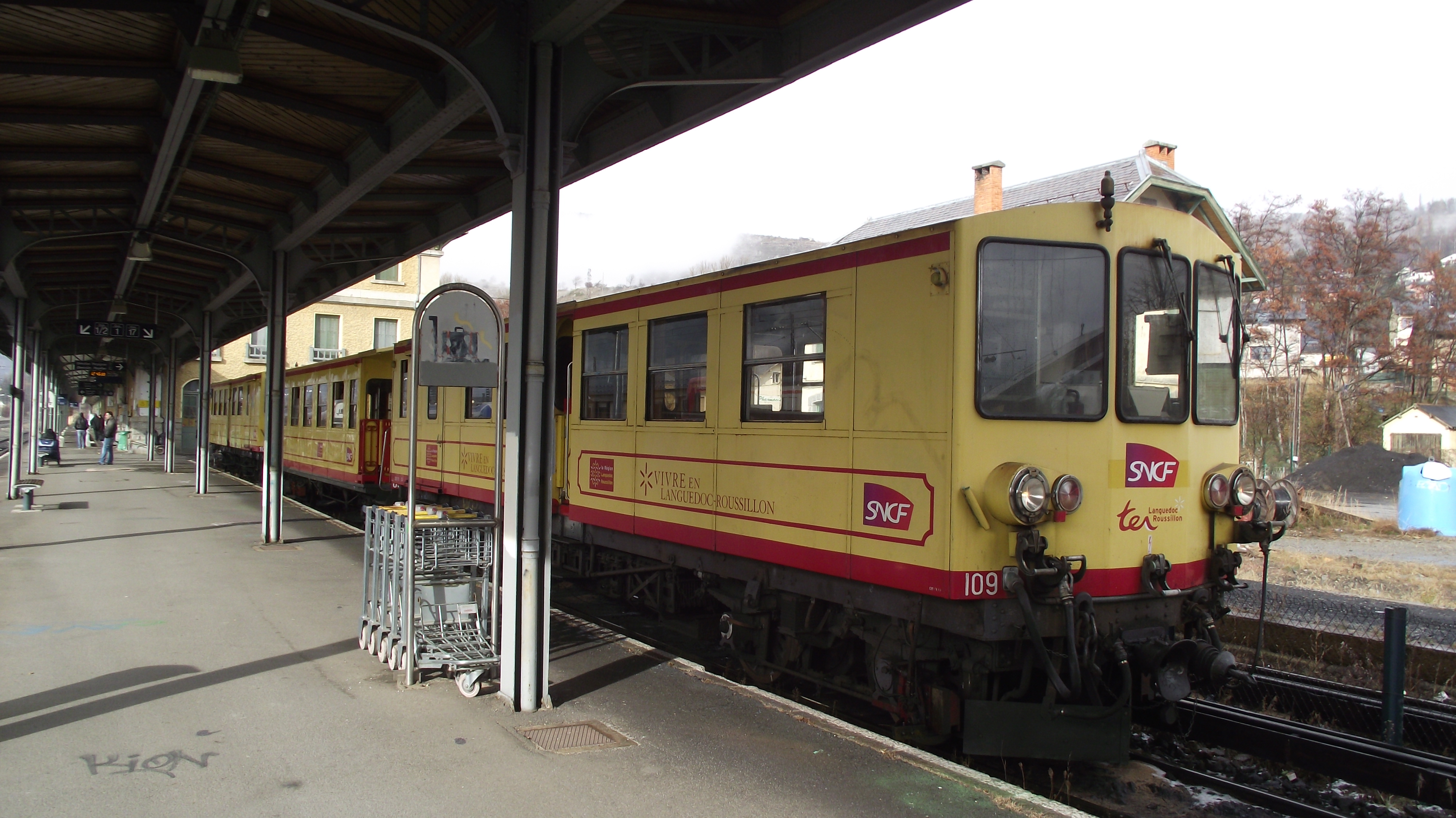 De gele trein in Latour-en-Carol